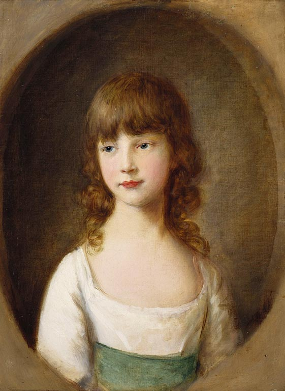 Portrait de la Princesse Mary, agée de 6 ans